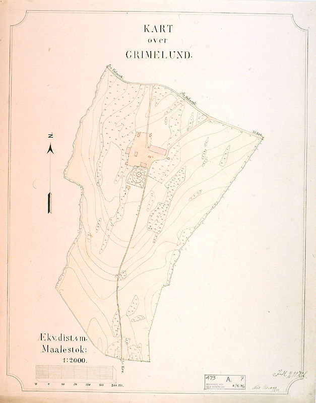 Kart over søndre del av Grimelund gård i 1899